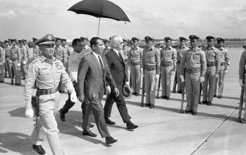 Staatsbesuch Bundespräsident (Heinrich Lübke) auf den Philippinen 1963 Ankunft in Manila